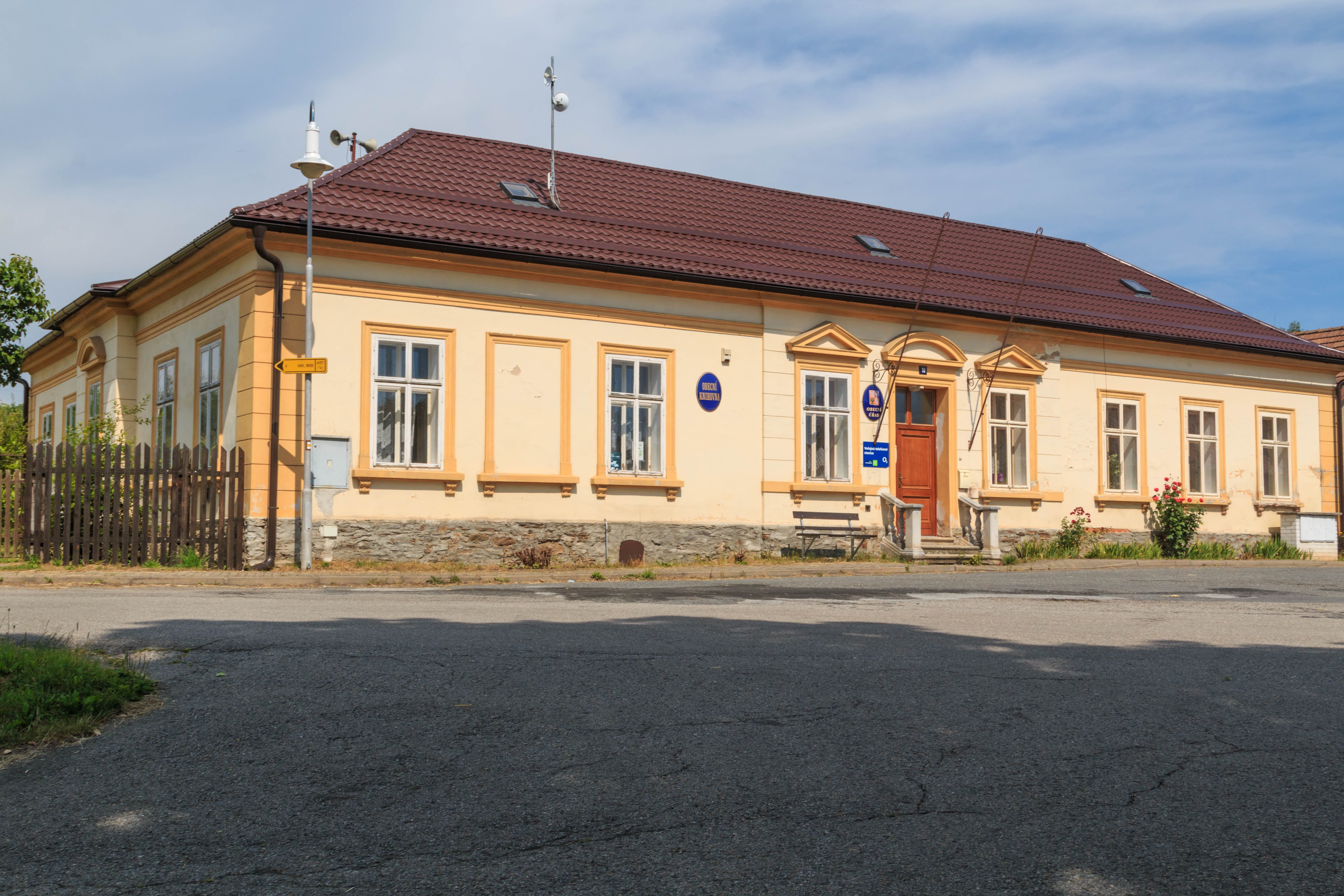 Břevnice obecní úřad